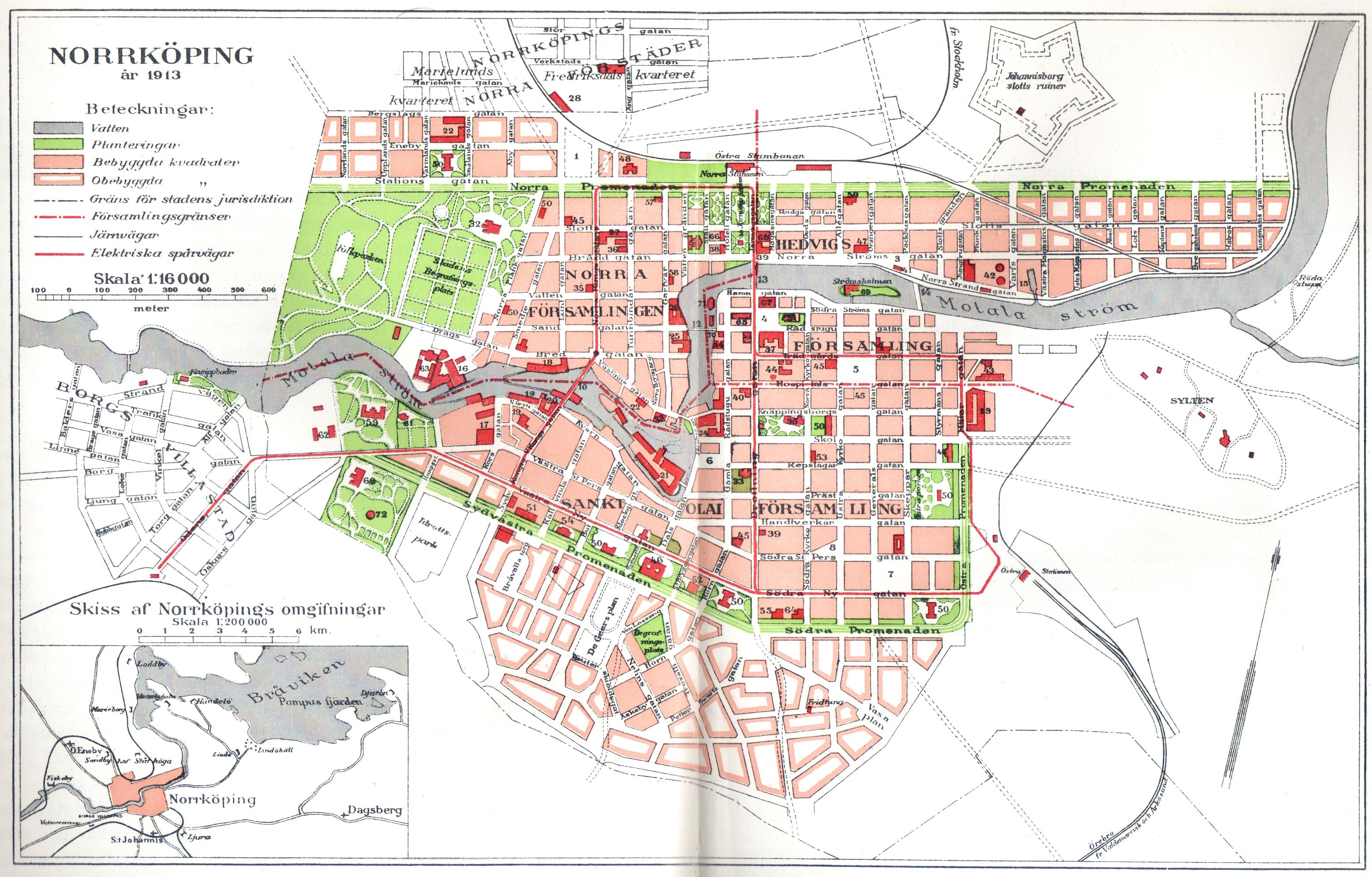 Map of Norrköping, Sweden